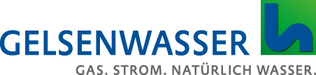 GELSENWASSER-Logo